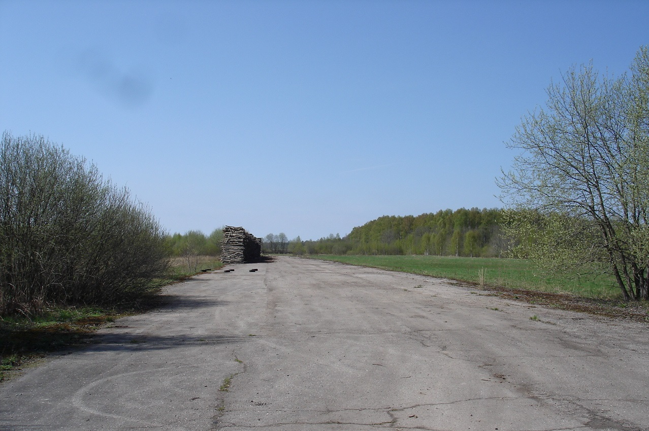 Взлётно-посадочная полоса | Skrejceļš